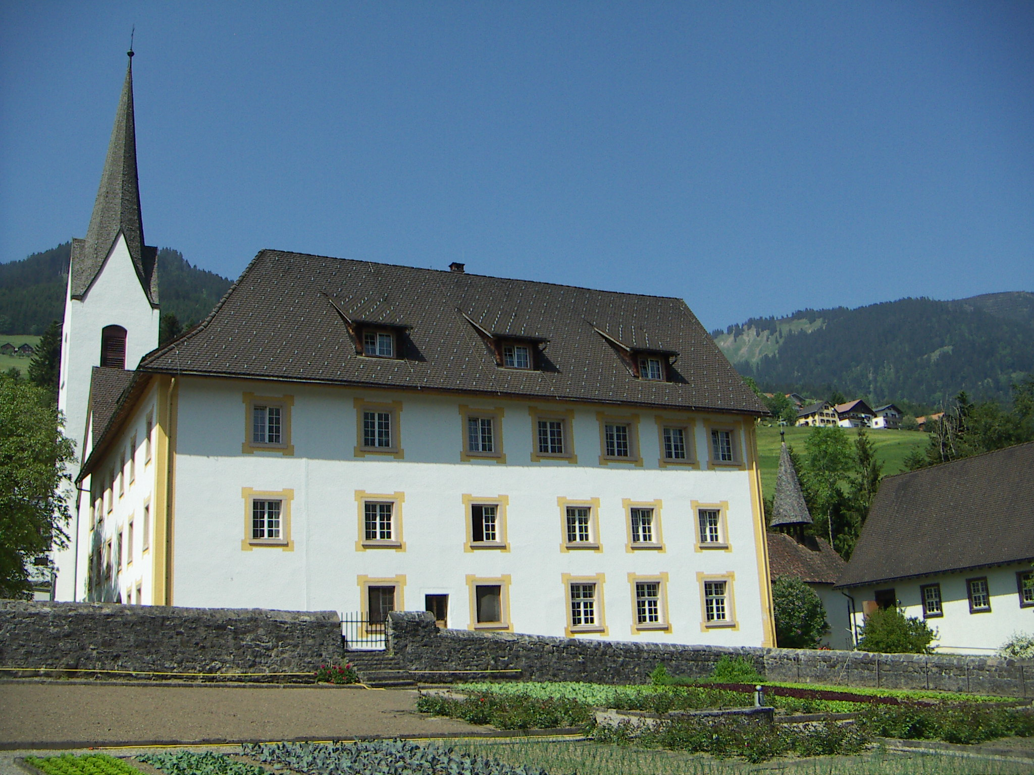 Benediktinerpropstei Sankt Gerold, links nach rechts: Kirchturm Propsteipfarrkirche, Klostertrakt, Antoninkapelle mit Glockendachreiter, Wibrhus, davor: Klostergarten